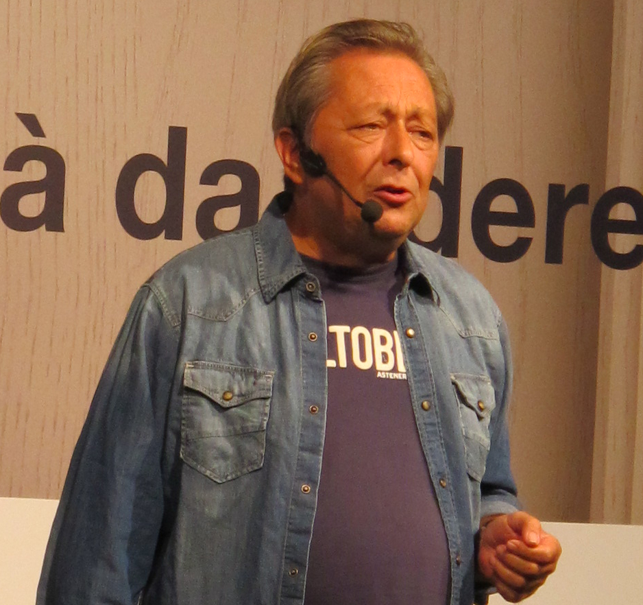 Il comico bolognese Duilio Pizzocchi, nome d'arte di Maurizio Pagliari, nel corso di un'esibizione a Rimini nel settembre 2012.